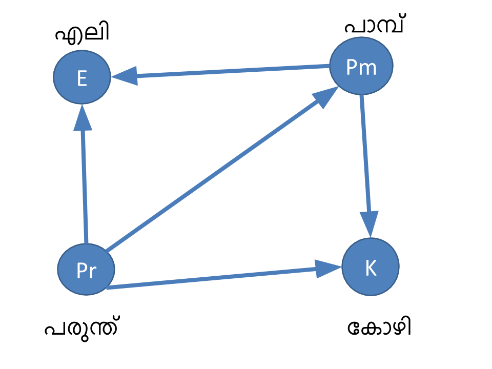 ജന്തുക്കൾ തമ്മിലുള്ള ഭക്ഷ്യശൃംഖല സദിശലേഖയ്ക്ക് ഉദാഹരണമാണ്